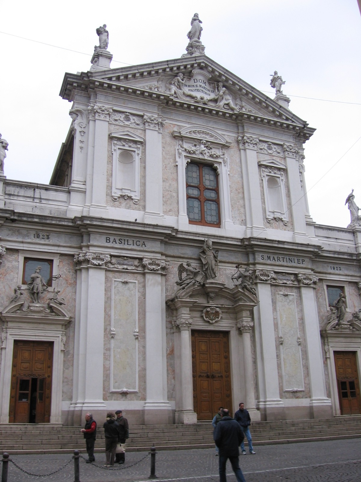 Alzano lombardo, Bergamo, Italia